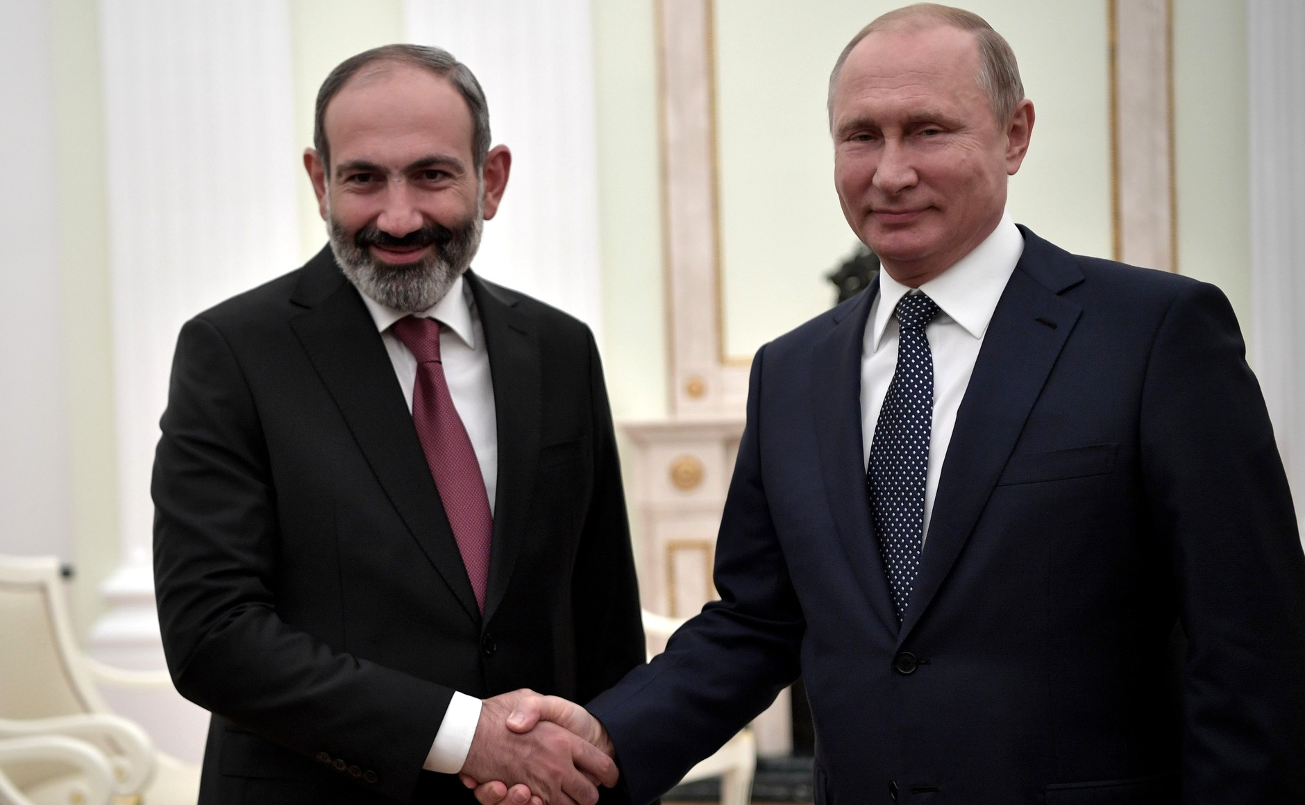 Встреча Президента России Владимира Путина с Премьер-министром Республики Армения Николом Пашиняном